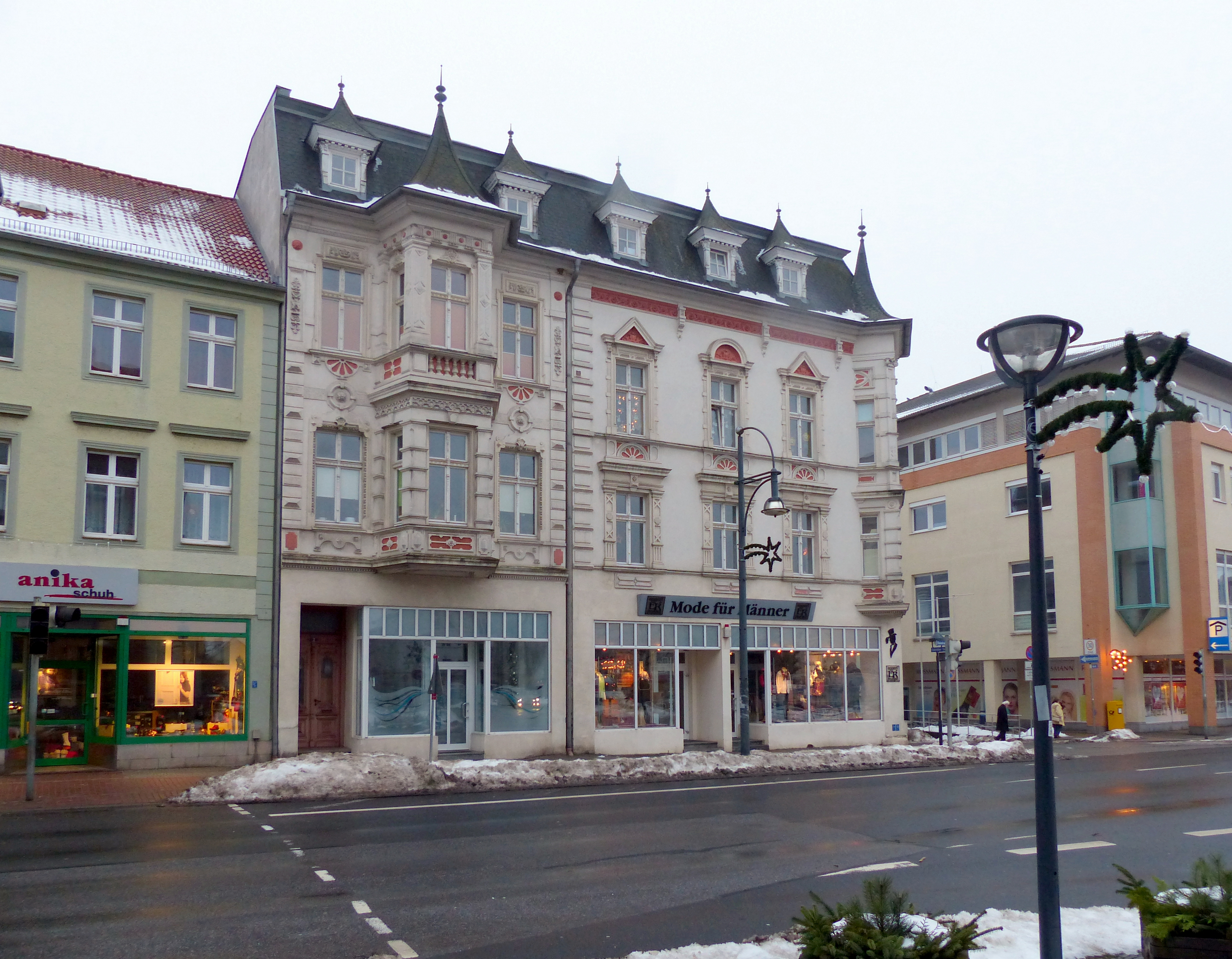 Anklam. Steinstraße 1-2, Nordseite